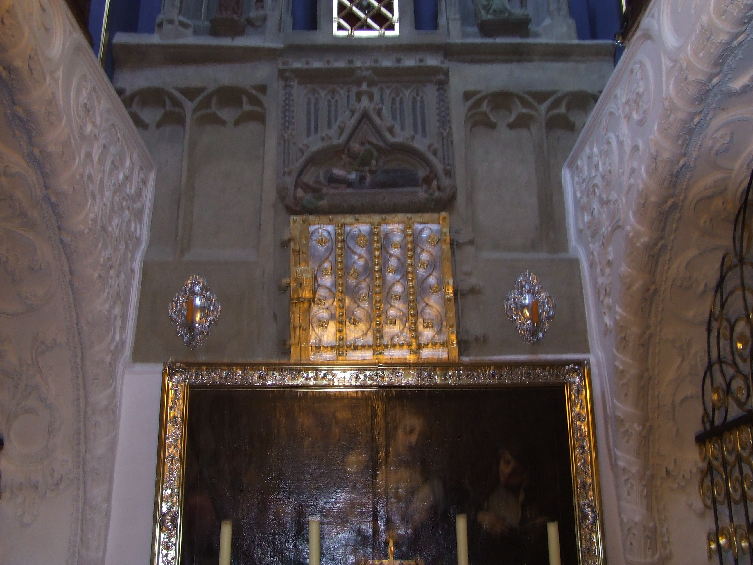 Die Krypta in der Kirche des Eichstätter Klosters St. Walburg mit den Reliquien der Heiligen Walburga